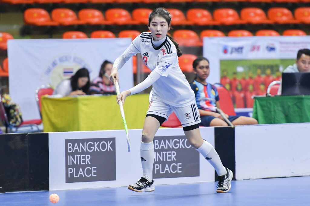 우레탄 재질의 경기장 플로어볼 여국선수